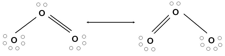 Molècula d'ozó representada per l'estructura de Lewis. Representativa de molècules que presenten mesomeria o ressonància.